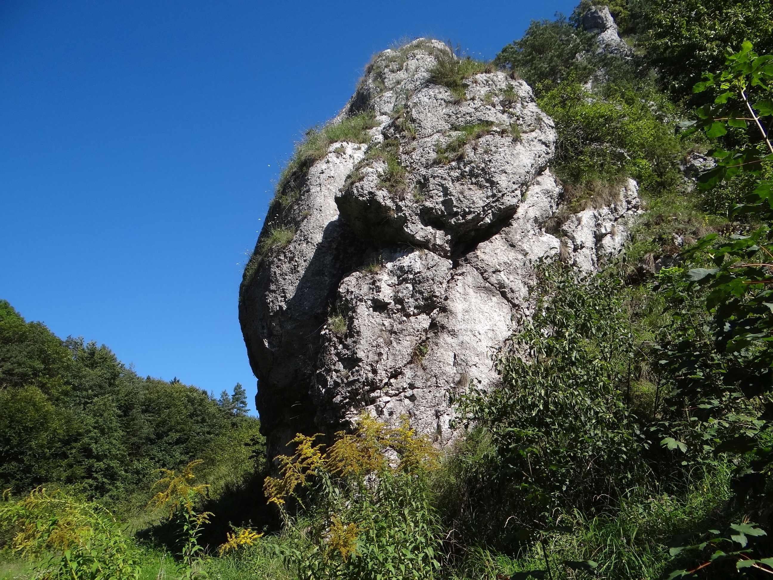 Poprzeczna Grzęda w Dolinie Bolechowickiej